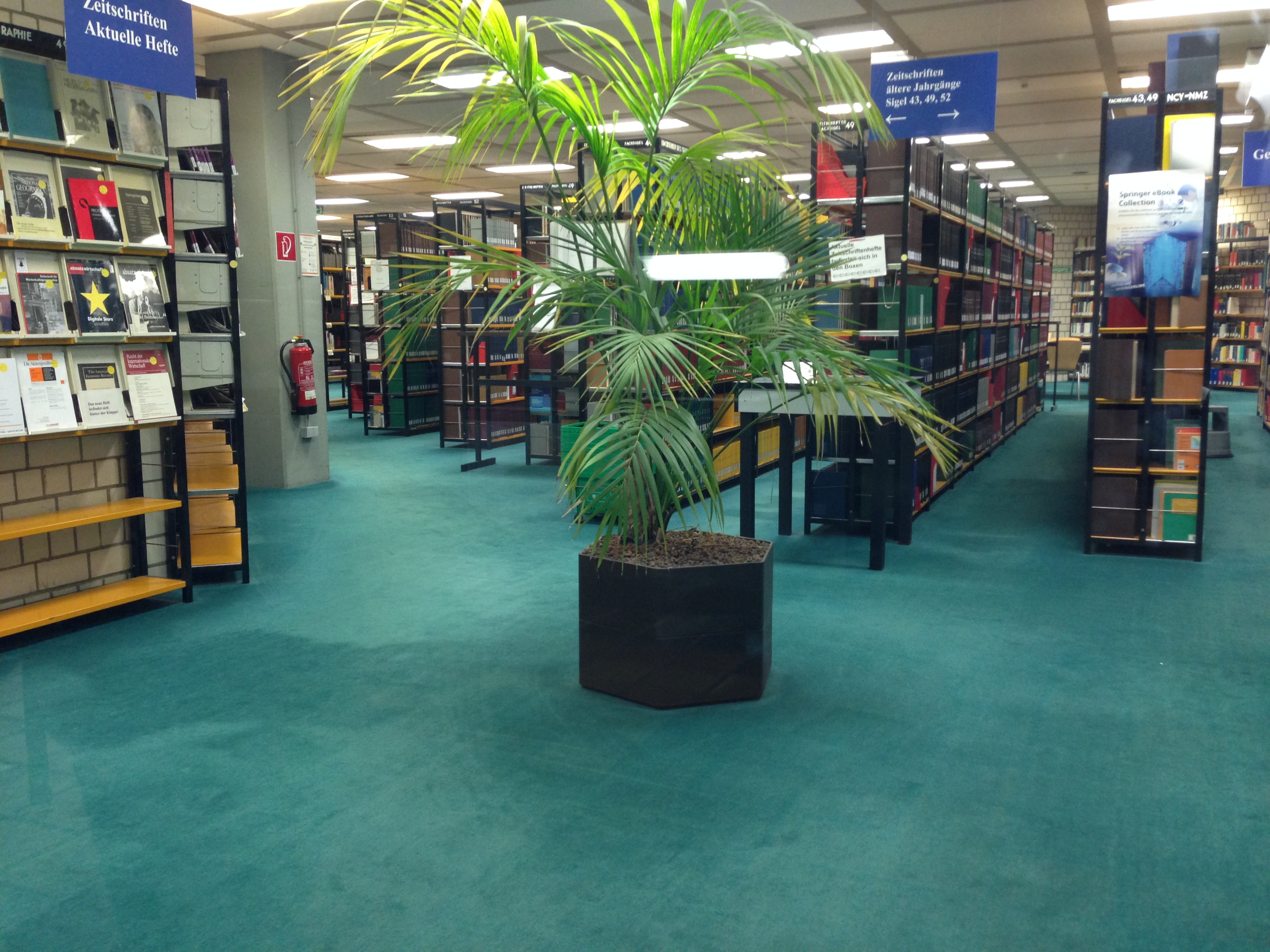 Fachbibliothek 2 der Universitätsbibliothek Wuppertal.